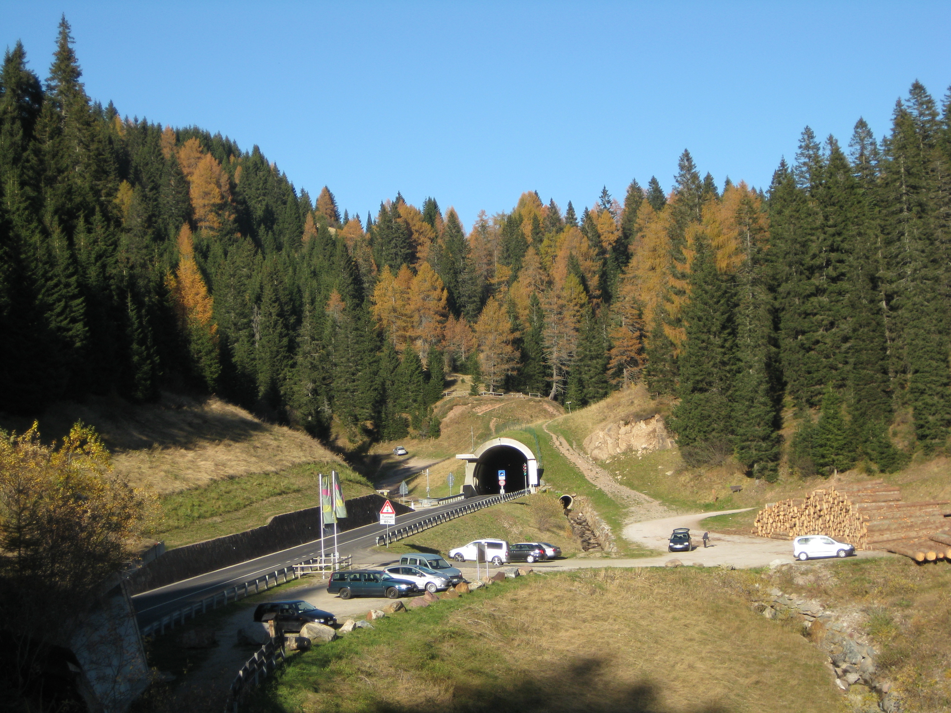 Der Eingang zum Tunnel unter dem Hofmahdjoch auf der Nonsberger Seite